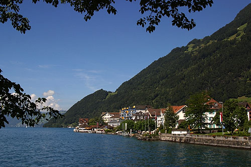 Gersau (Nr. 03.1-8834)